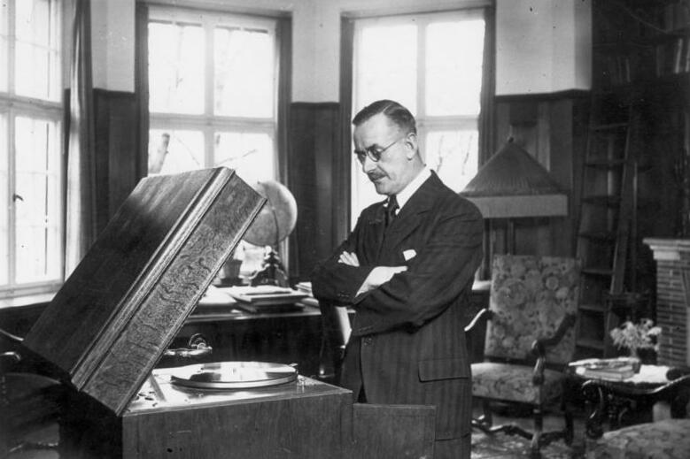 Zentralbild-Archiv Thomas Mann, bürgerlich-humanistischer Schriftsteller von Weltgeltung. geb.: 6.6.1875 in Lübeck gest.: 12.8.1955 Kilchberg (Schweiz) 1929 erhielt er den Nobelpreis. U.B.z: Thomas Mann in seinem Heim in München (1932) 13 661-32 [Scherl Bilderdienst]